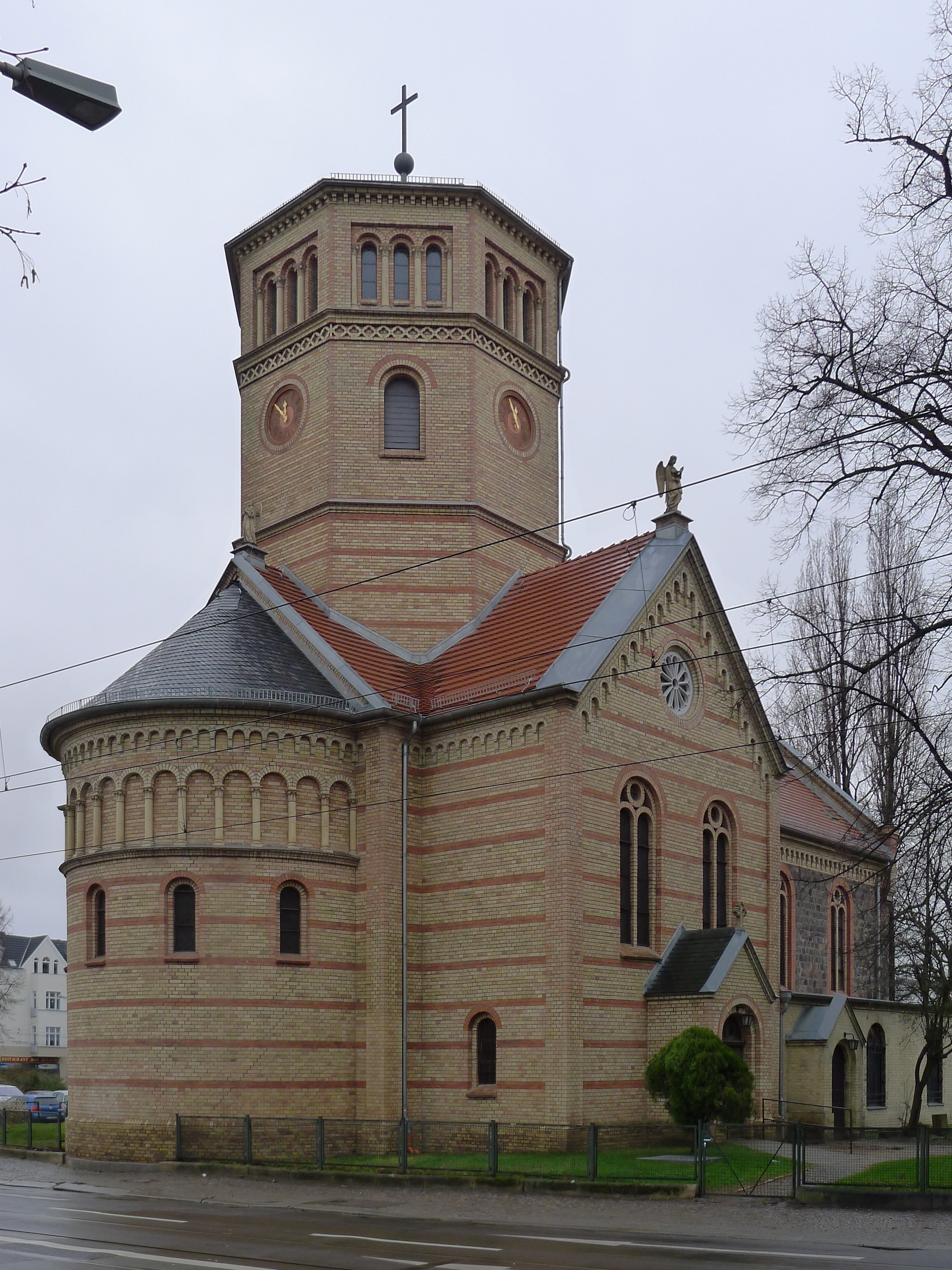 Neuer Teil der Kirche